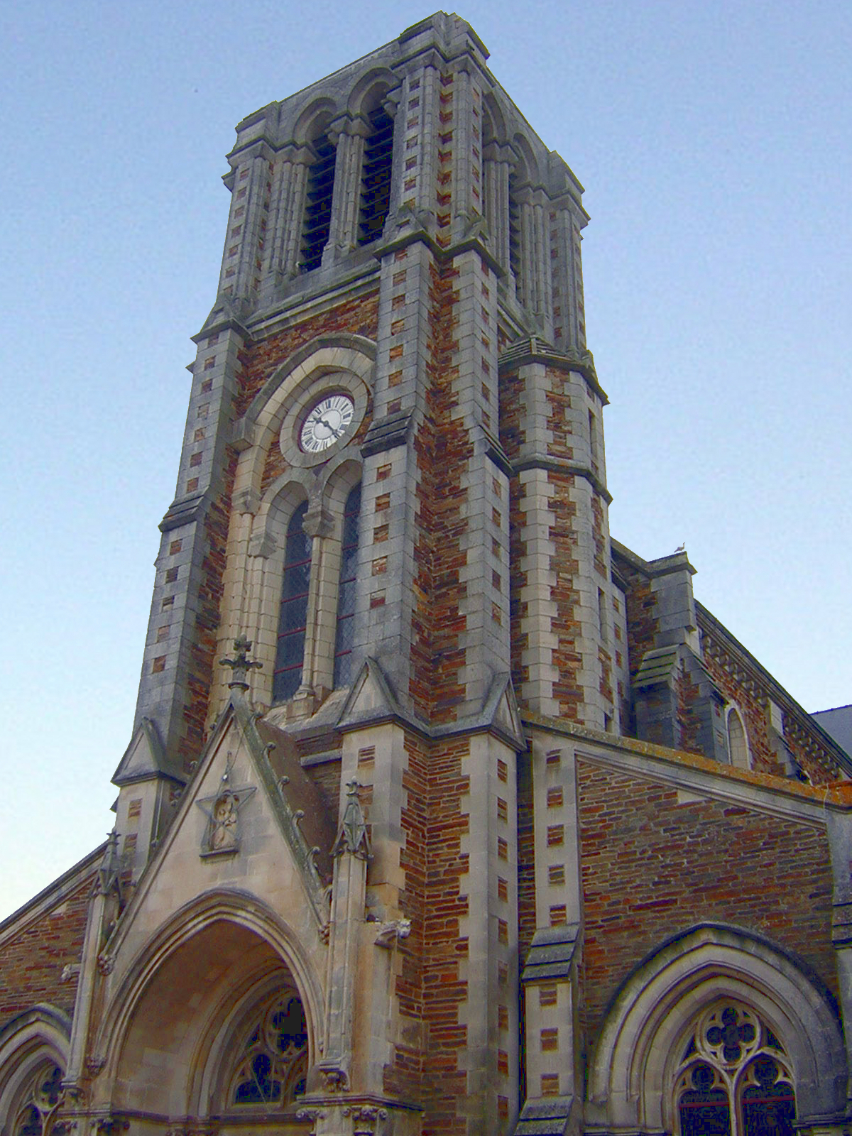 église St Léger de Joué-sur-Erdre